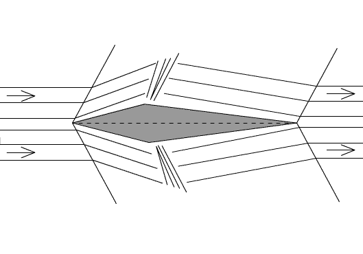 Überschall-Flügel, selbst gezeichnet